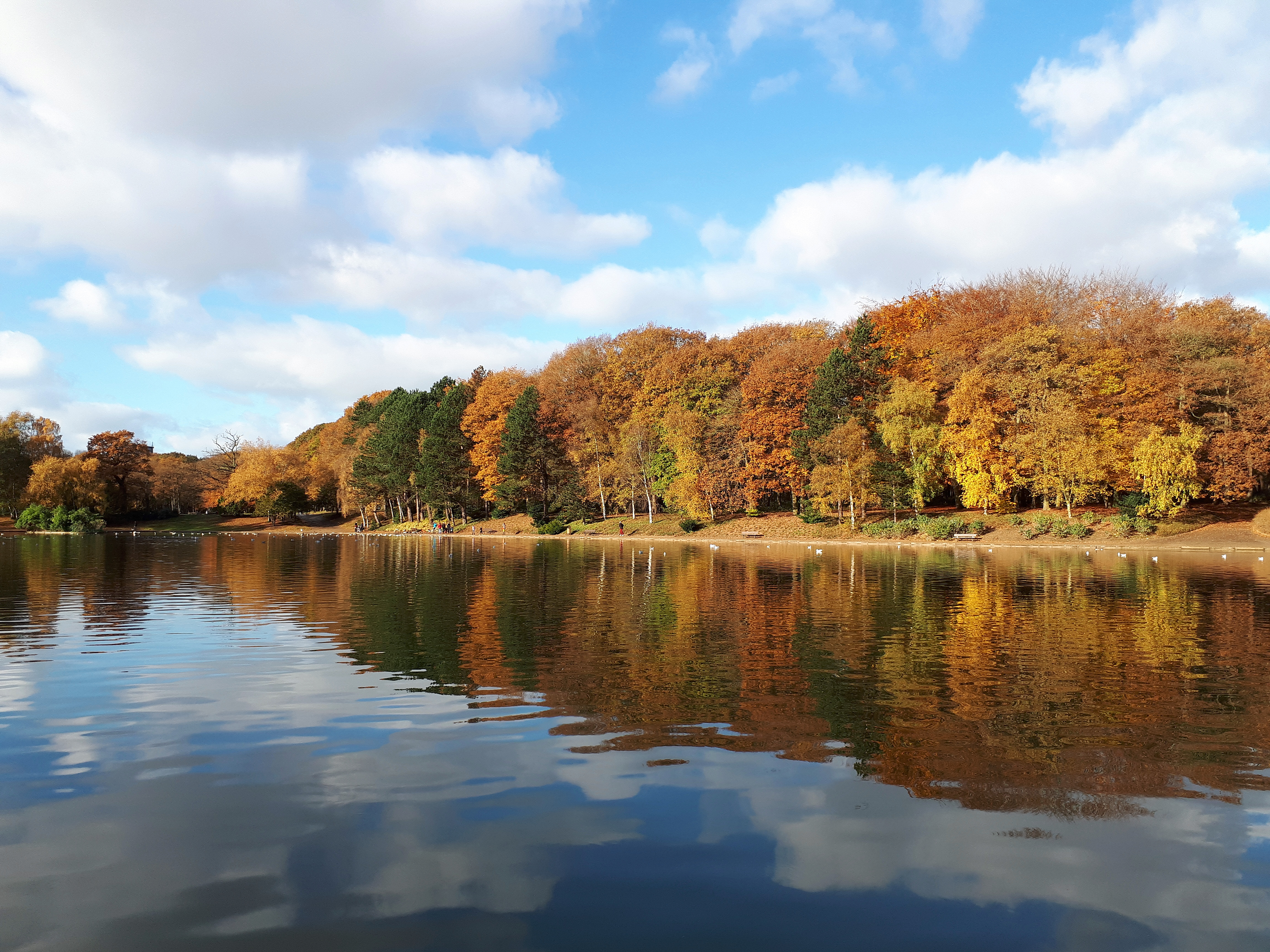 Parc de Montgeon au Havre